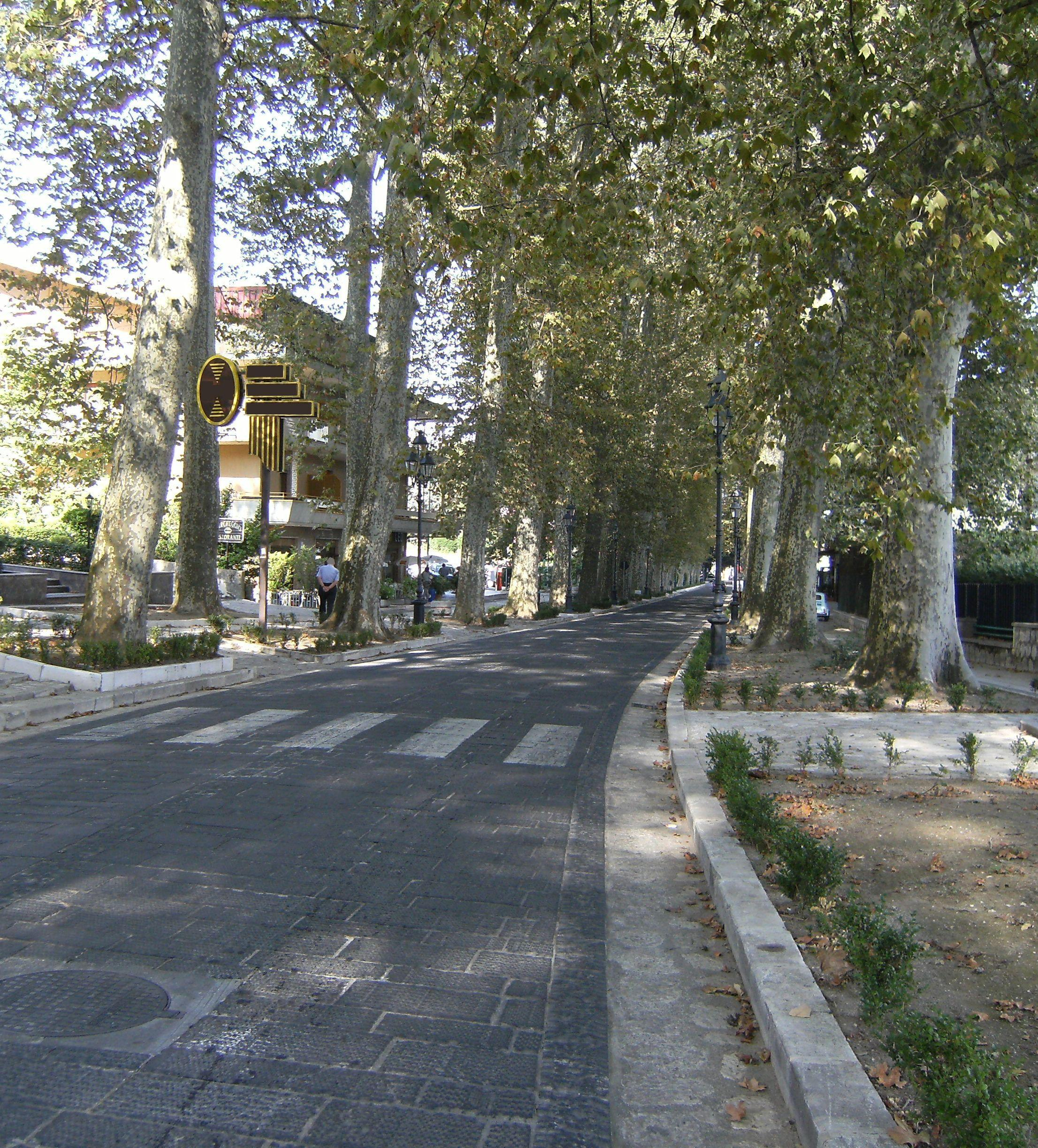 Via San Modestino, Mercogliano, Provincia di Avellino